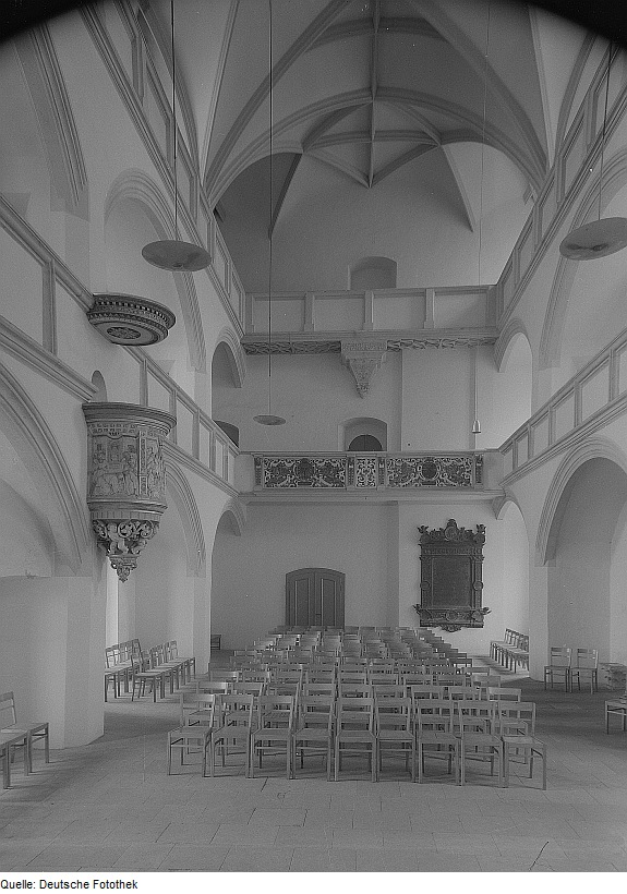 Original image description from the Deutsche Fotothek Torgau. Schloss Hartenfels, Kapelle (erste protestantische Kirchenneubau, 1544 von Martin Luther geweiht)